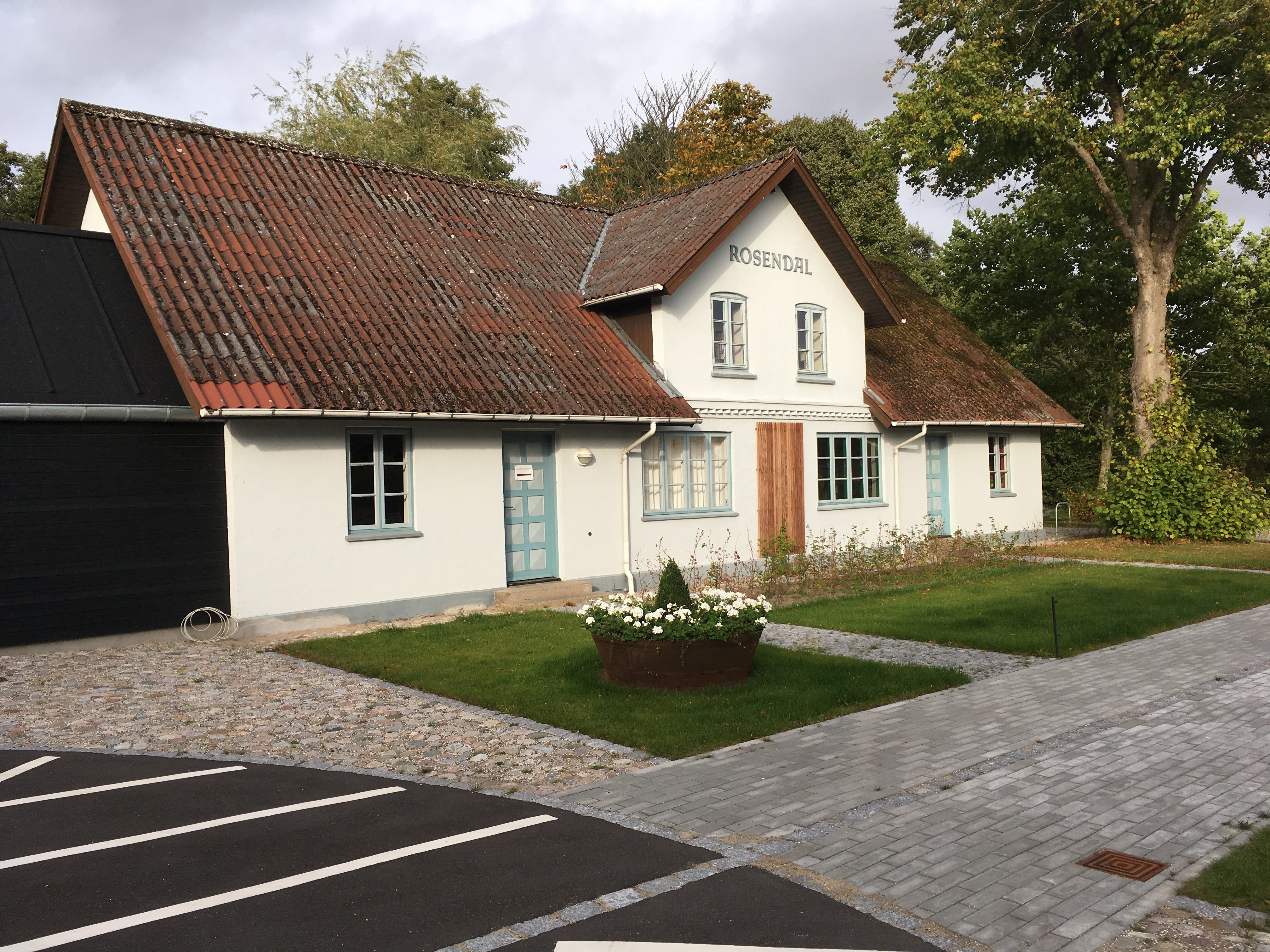 Stuehuset Rosendal er i dag en del af museet i Hadsund.